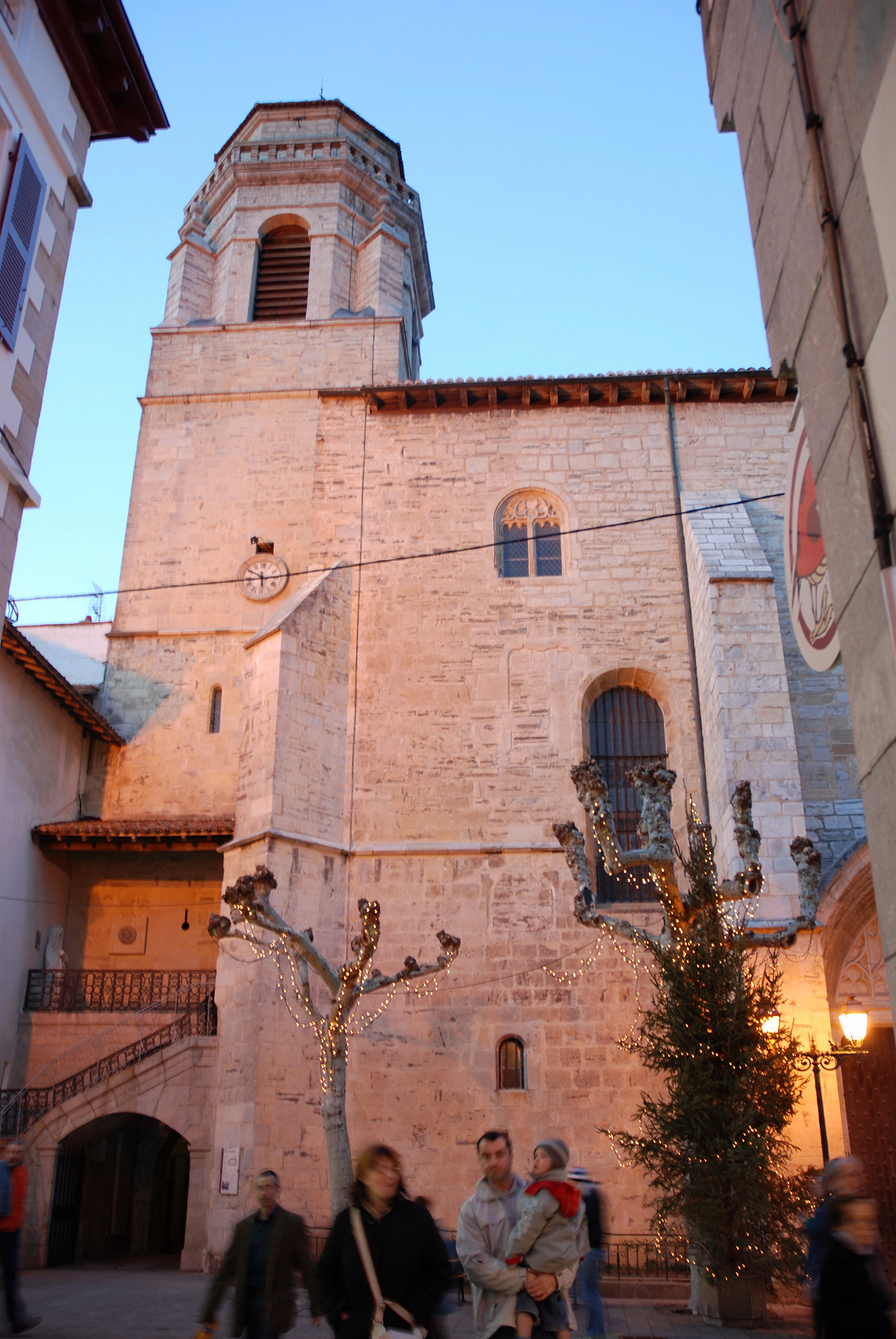 Saint-Jean-de-Luz, le clocher de l'église Saint-Jean-Baptiste. Photo prise le 03/01/07 par Harrieta171